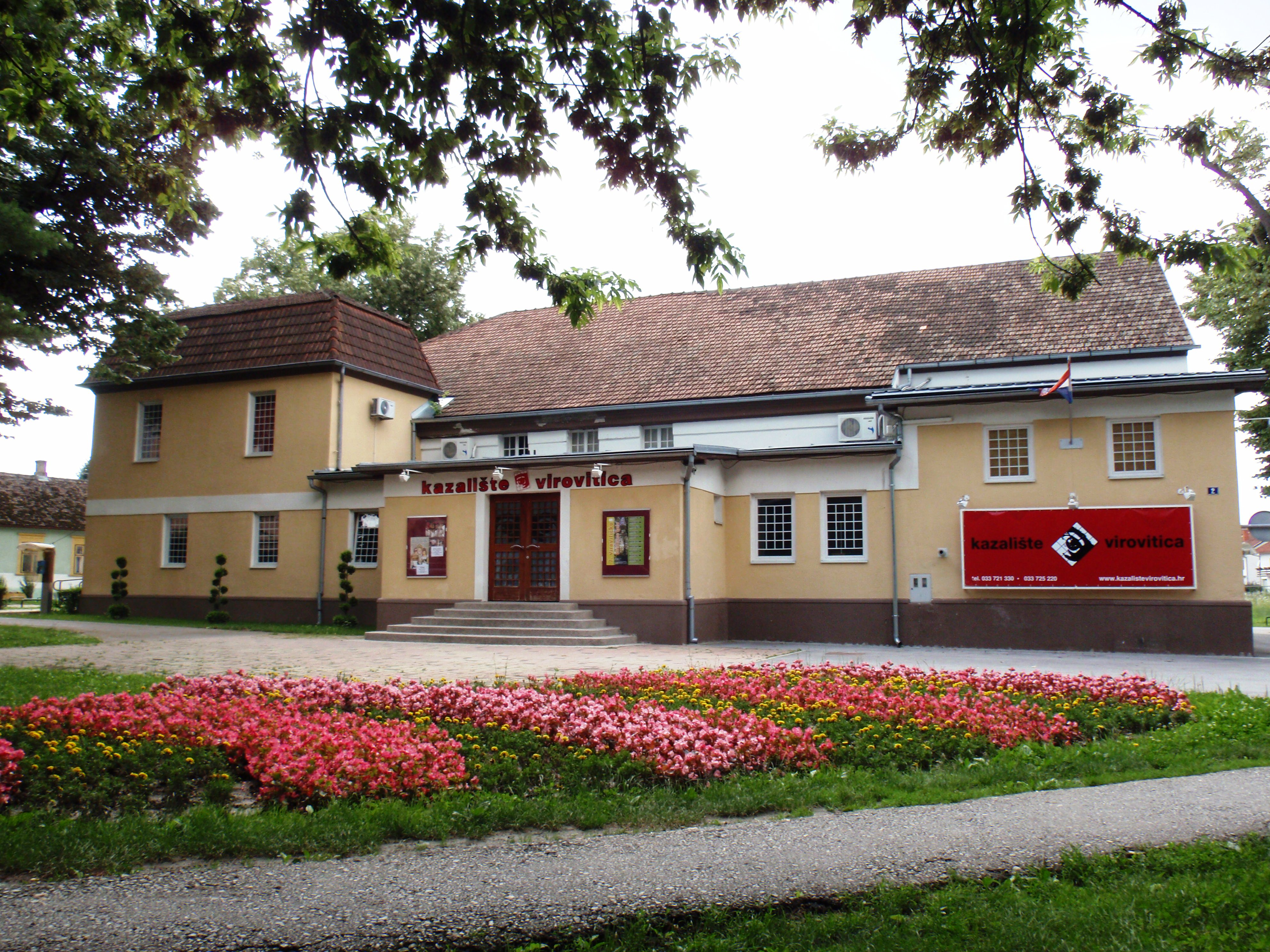 Virovitica